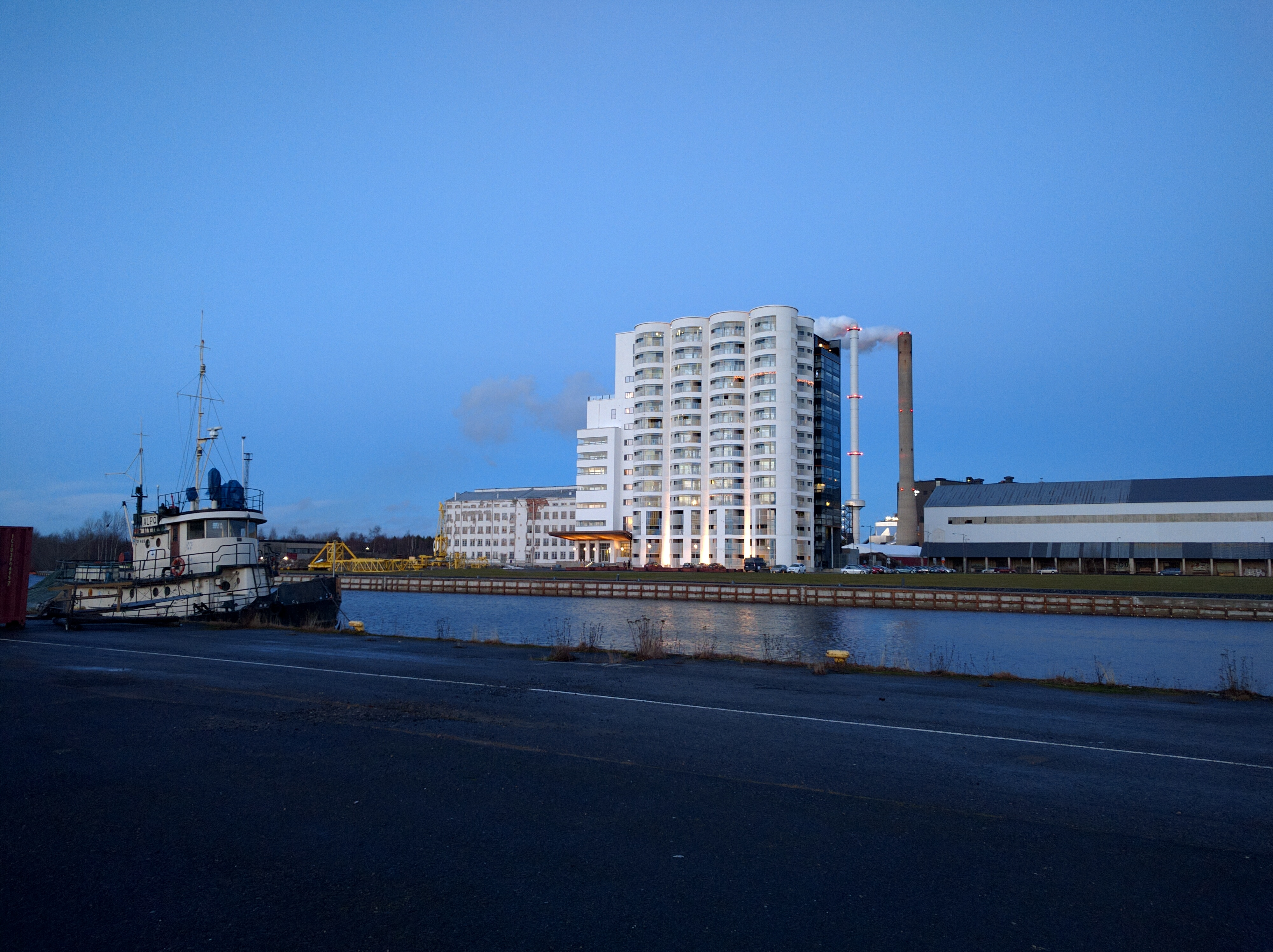 Entisistä SOK:n viljasiiloista saneerattu asuinrakennus Toppilansalmessa kuvattuna Toppilansaaren puolelta